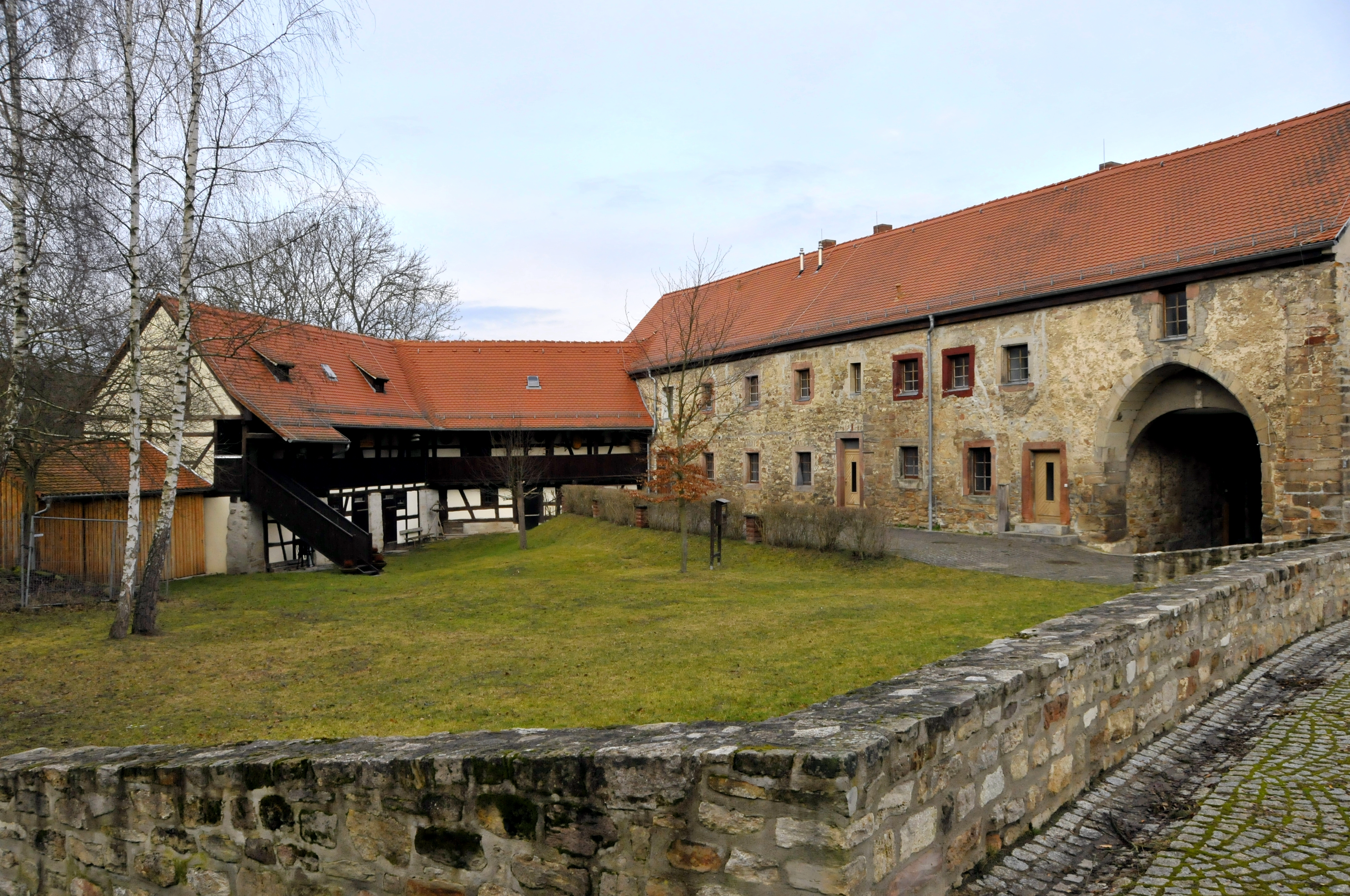 Tannroda, Schloss, ehem. Stallgebäude